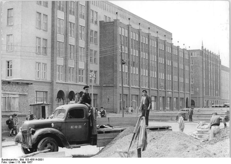 Rostock, Lange Straße, HO-Warenhaus Zentralbild Löwe 15.5.1957 Vei-Noa- Das größte HO-Warenhaus der DDR entsteht in Rostock. Für 12,7 Millionen DM wird in der Hafenstadt Rostock das größte HO-Warenhaus unserer Republik mit einer Verkaufsfläche von 6.000 Quadratmetern gebaut. UBz: Das fertiggestellte Hauptgebäude des HO-Warenhauses an der Langen Straße.